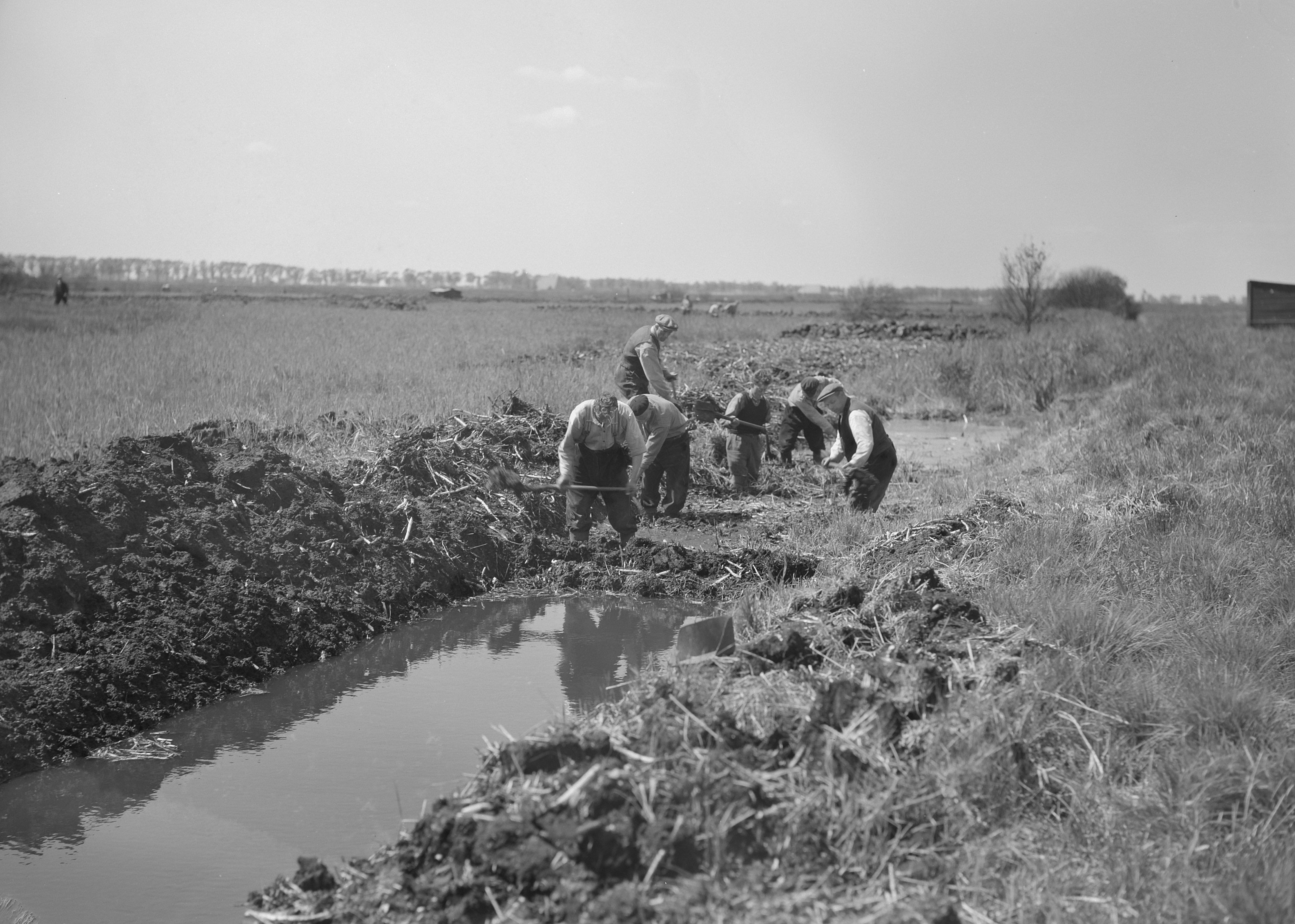 Collectie / Archief : Fotocollectie Nederlandse Heidemaatschappij Reportage / Serie : [ onbekend ] Beschrijving : normalisatie van beken, graven en dempen van sloten, leggen riolering, duikers en betuining, arbeiders, werkzaamheden, sloten, geulen, petgat, kragge, Haskerveenpolder Datum : 1952 Locatie : Haskerveenpolder Trefwoorden : arbeiders, duikers en betuining, geulen, graven en dempen van sloten, leggen riolering, normalisatie van beken, sloten, werkzaamheden Persoonsnaam : kragge, petgat Fotograaf : [onbekend] Auteursrechthebbende : Nationaal Archief Materiaalsoort : Negatief (zwart/wit) Nummer archiefinventaris : bekijk toegang 2.24.06.02 Bestanddeelnummer : 162-0066